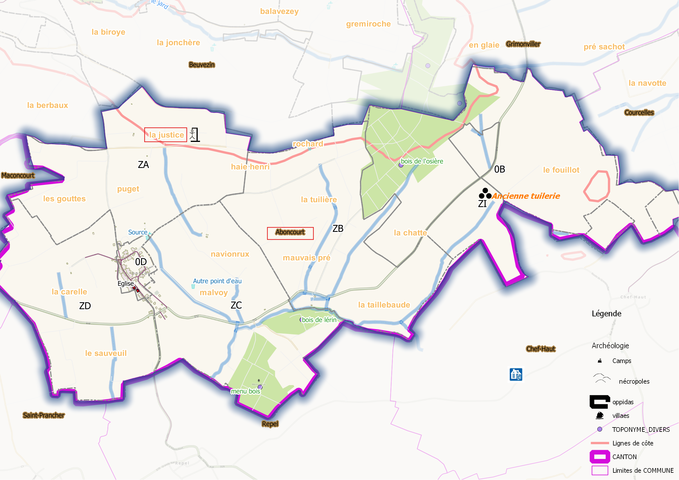 Aboncourt (ban communal) OSM et Qgis, mentions additionnelles